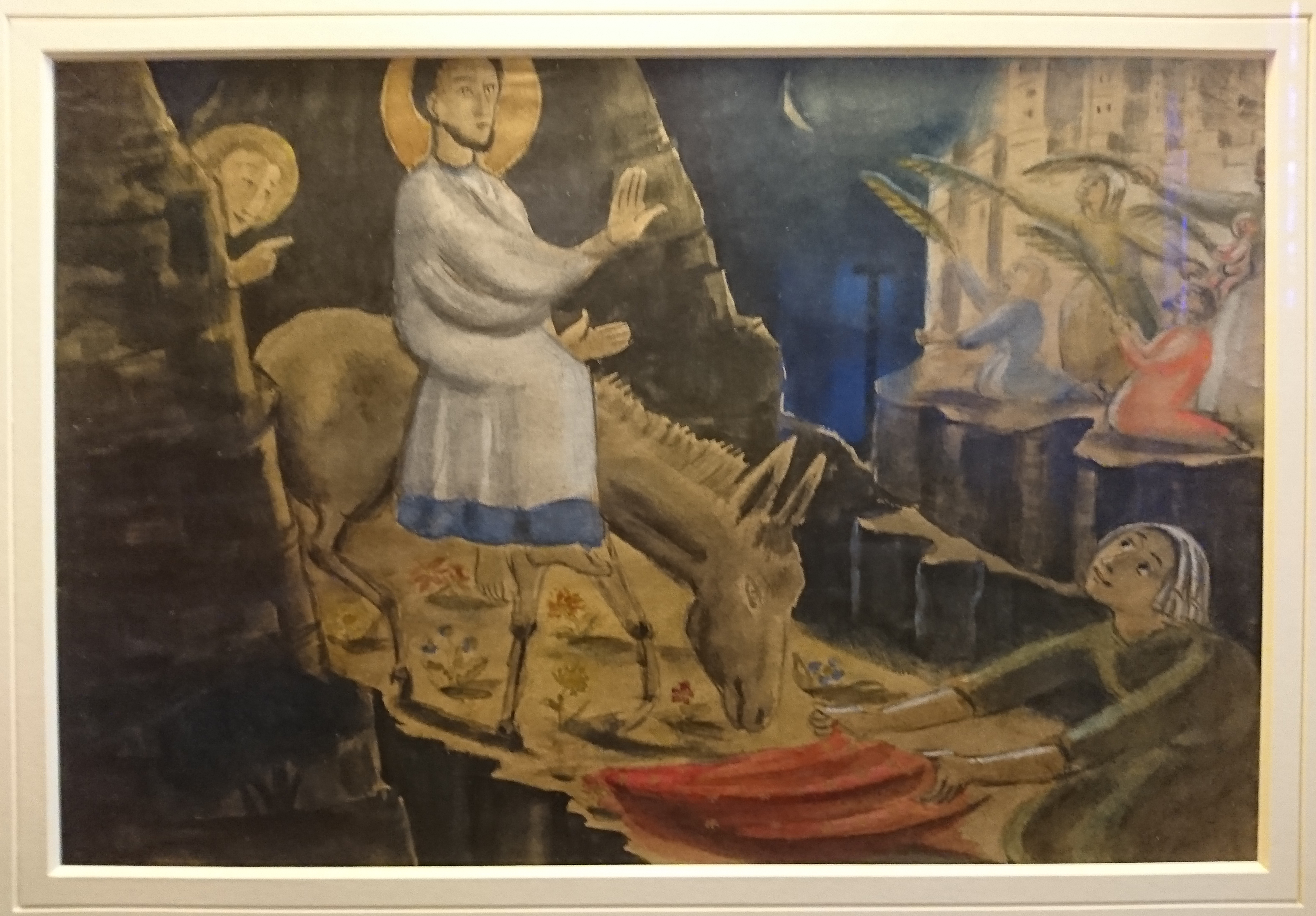 Anita Rée, Einzug in Jerusalem, Entwurf zu einem Teil des abgelehnten Altar-Triptychons der Ansgarkirche in Hamburg-Langenhorn. Anita Rée (1885–1933) Alternative names Anita ReeDescriptionGerman painterDate of birth/death 9 February 1885 12 December 1933Location of birth/death Hamburg Kampen/SyltWork location HamburgAuthority control : Q274026 VIAF: 807699 ISNI: 0000 0000 6674 4388 ULAN: 500056250 LCCN: n86123739 Open Library: OL5484054A WorldCat creator QS:P170,Q274026 (Rechts oben ist leider eine senkrechte, bläuliche Lichtreflektion zu sehen)